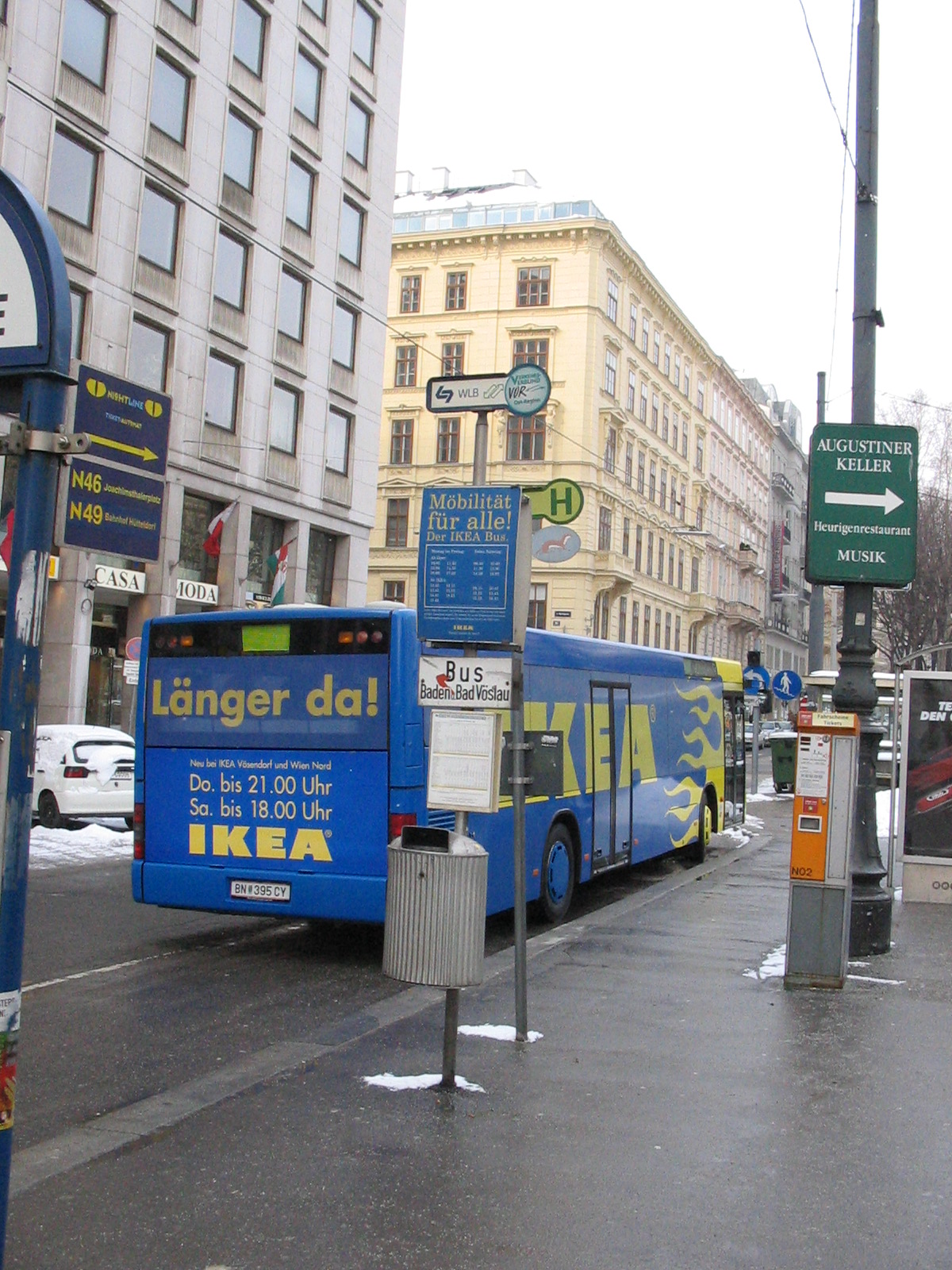 IKEA Bus, Wien. Der IKEA Bus transportiert Personen kostenfrei von der Wiener Innenstadt zur IKEA Filiale der SCS (ShoppingCitySüd).